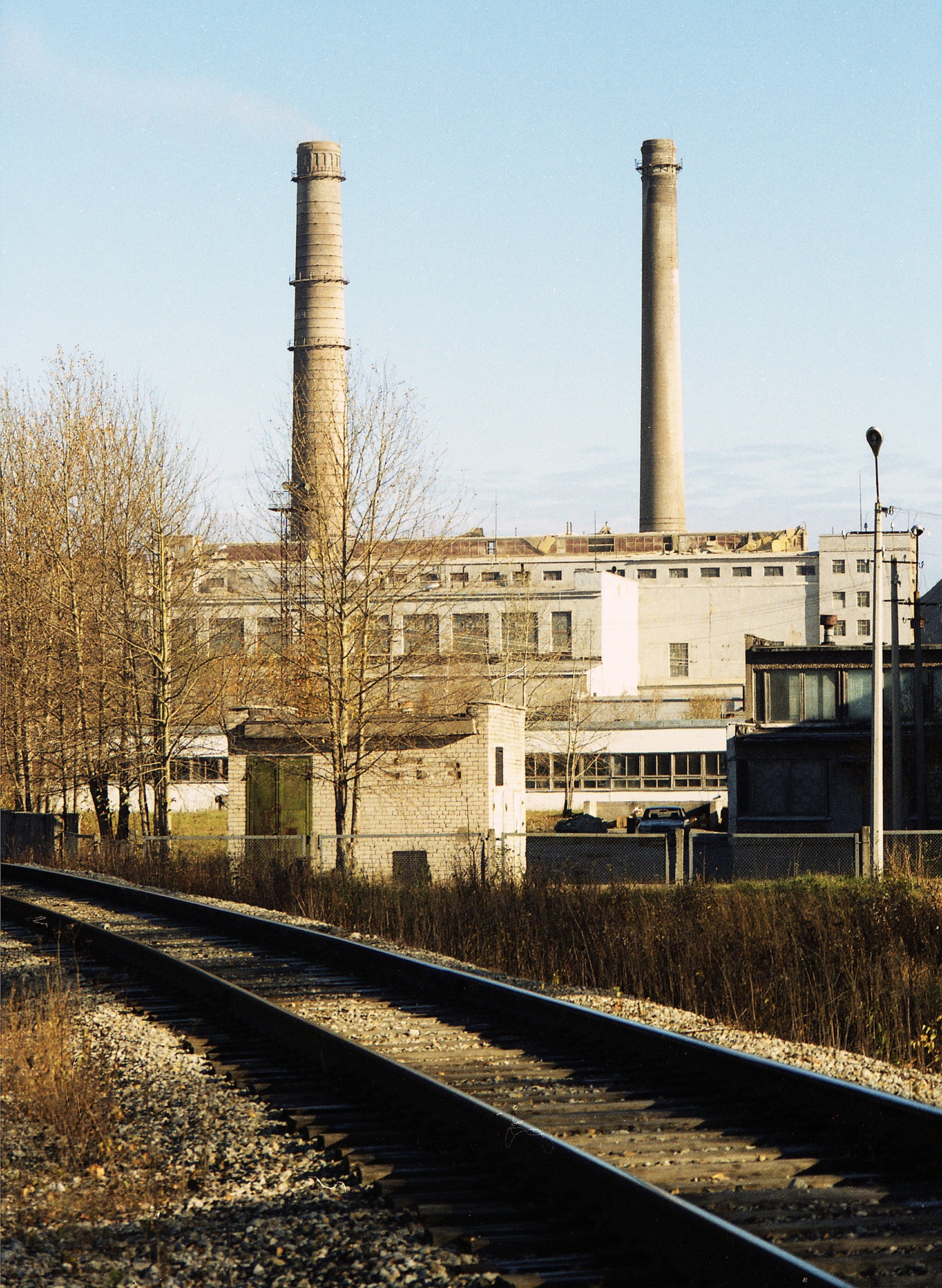 Kohtla-Järve Ahtme linnaosa soojuselektrijaama katlamaja korstnad 96